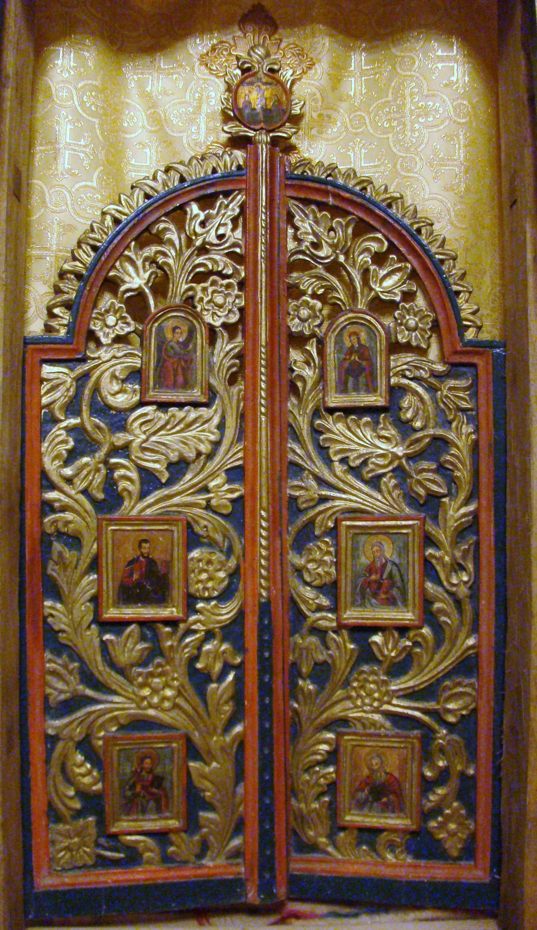 Biserica de lemn „Adormirea Maicii Domnului”,sat STĂNIJA; comuna BUCEŞ